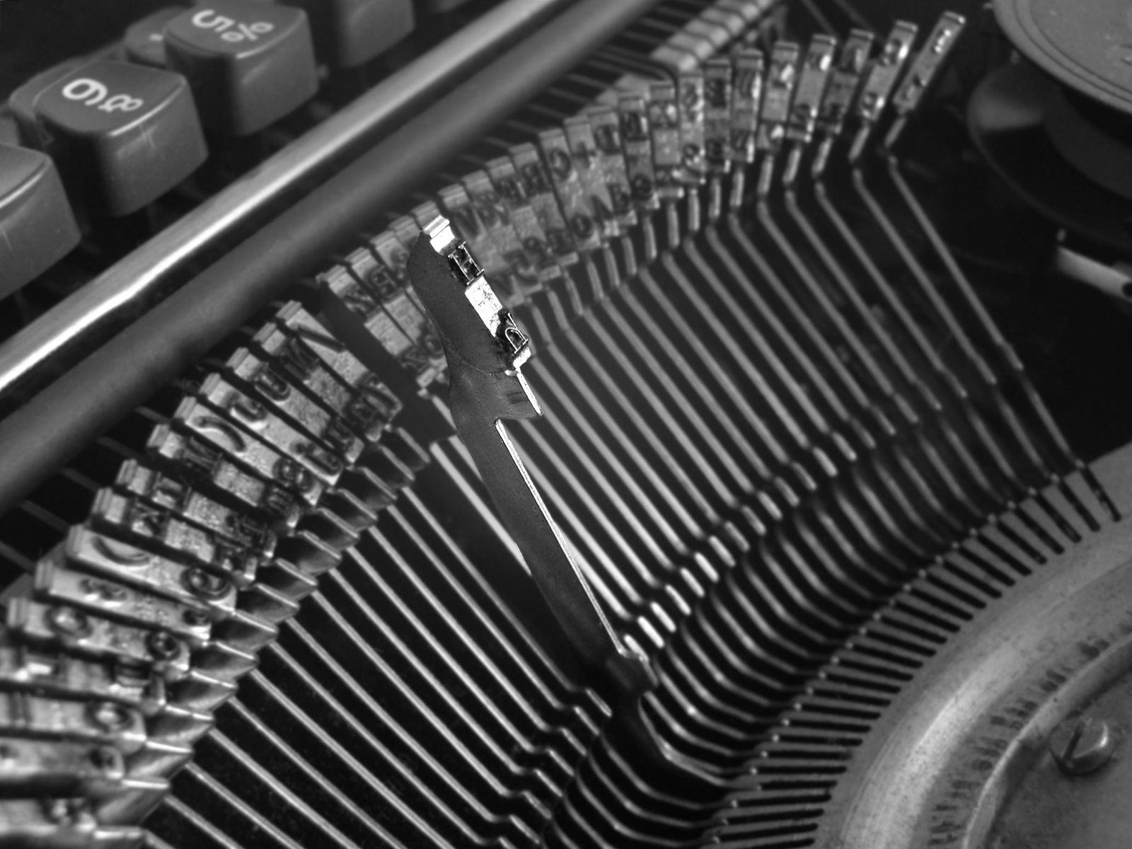 Typewriter, Schreibmaschine, Typen